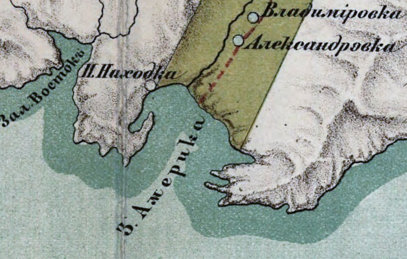 Фрагмент карты Южно-Уссурийского края 1870 года, район залива Америка